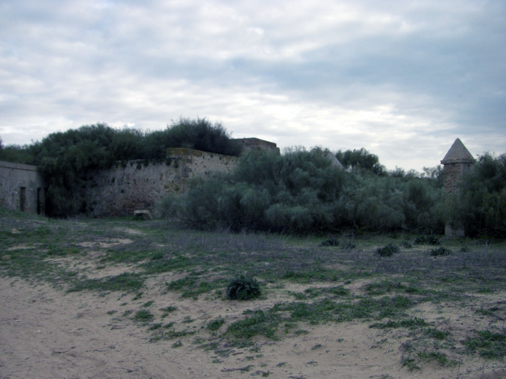 Vista este de la bateria de Urrutia desde la entrada al patio.